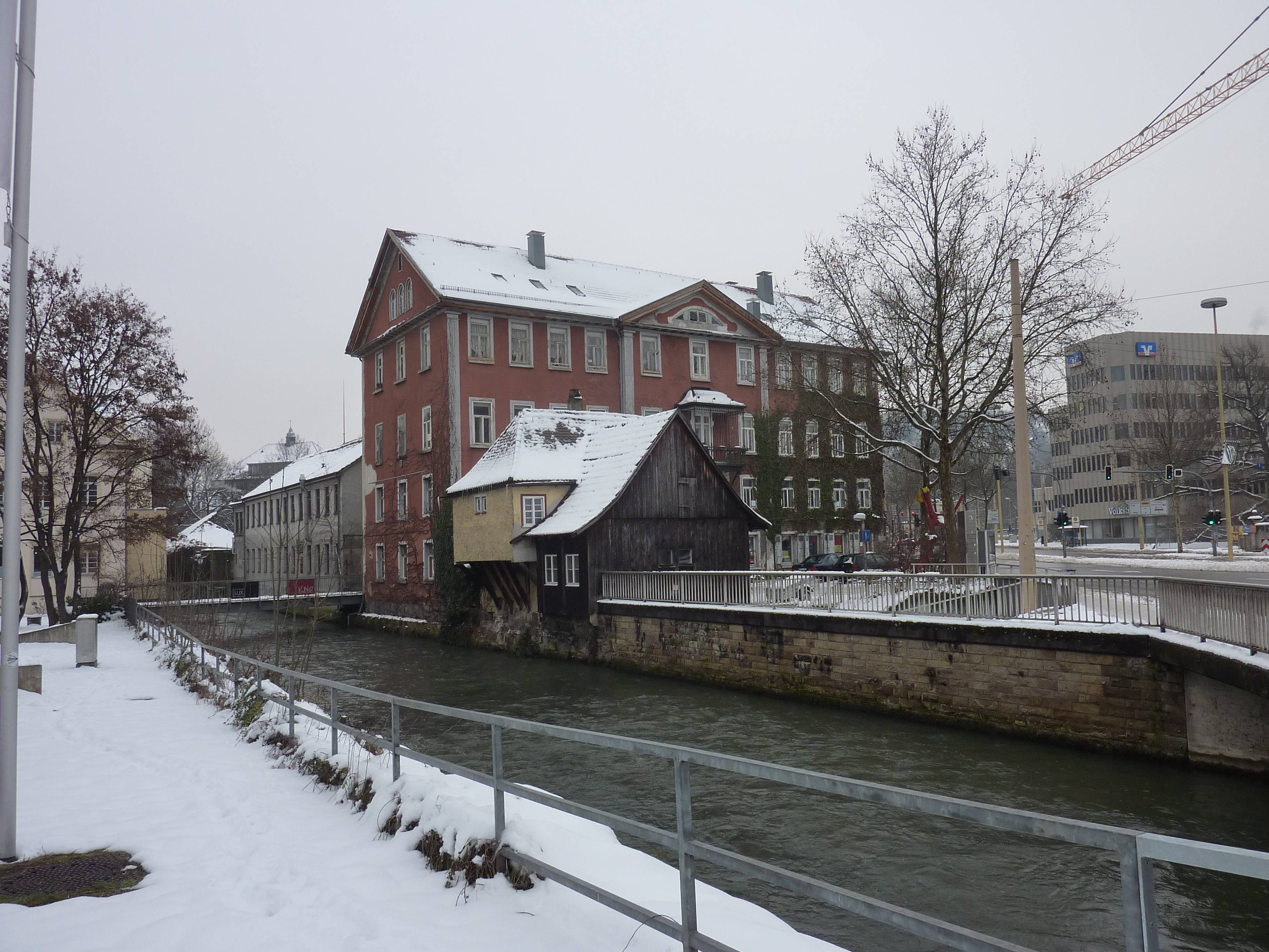 Maille 4 in Esslingen